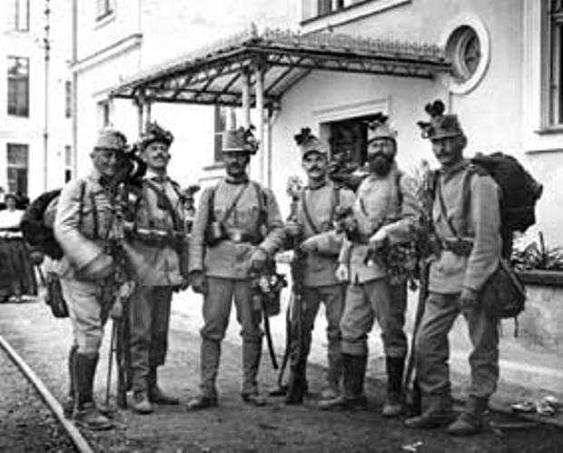 Landewehr-Regiment Nr. 2 in Linz